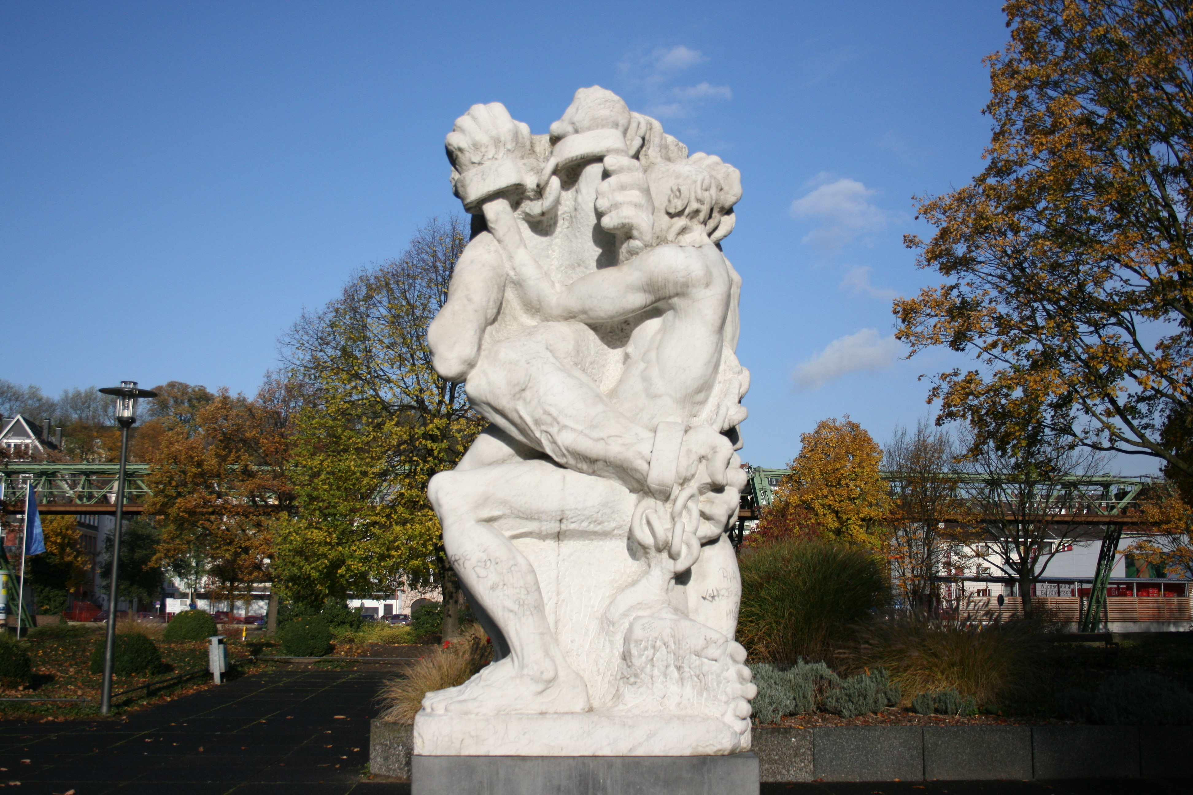 Die starke Linke von Alfred Hrdlicka im Engelsgarten, Historisches Zentrum, Wuppertal